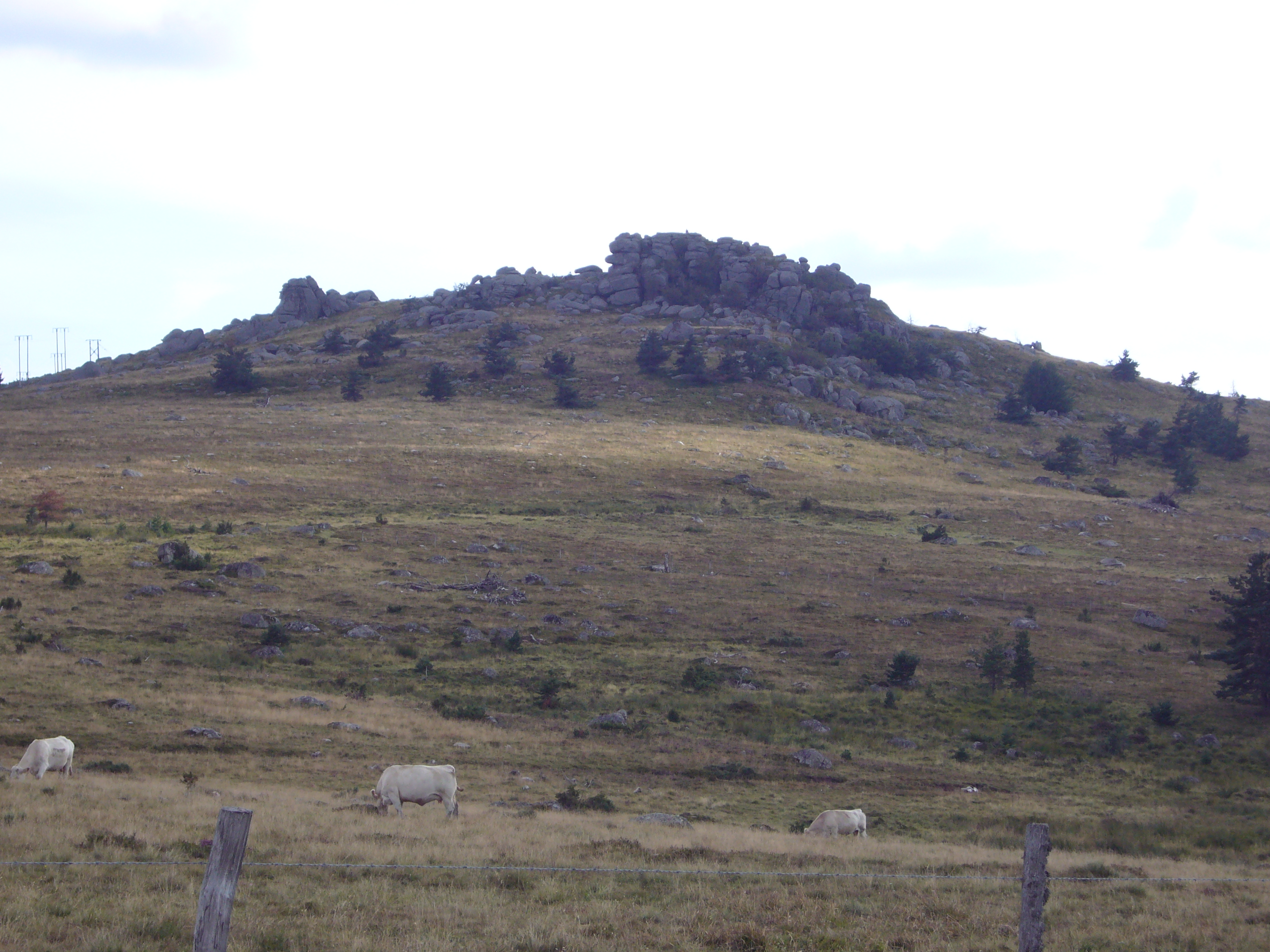 Le signal de Randon (1551 m), point culminant de la Margeride (Lozère), vu du col du Cheval Mort.